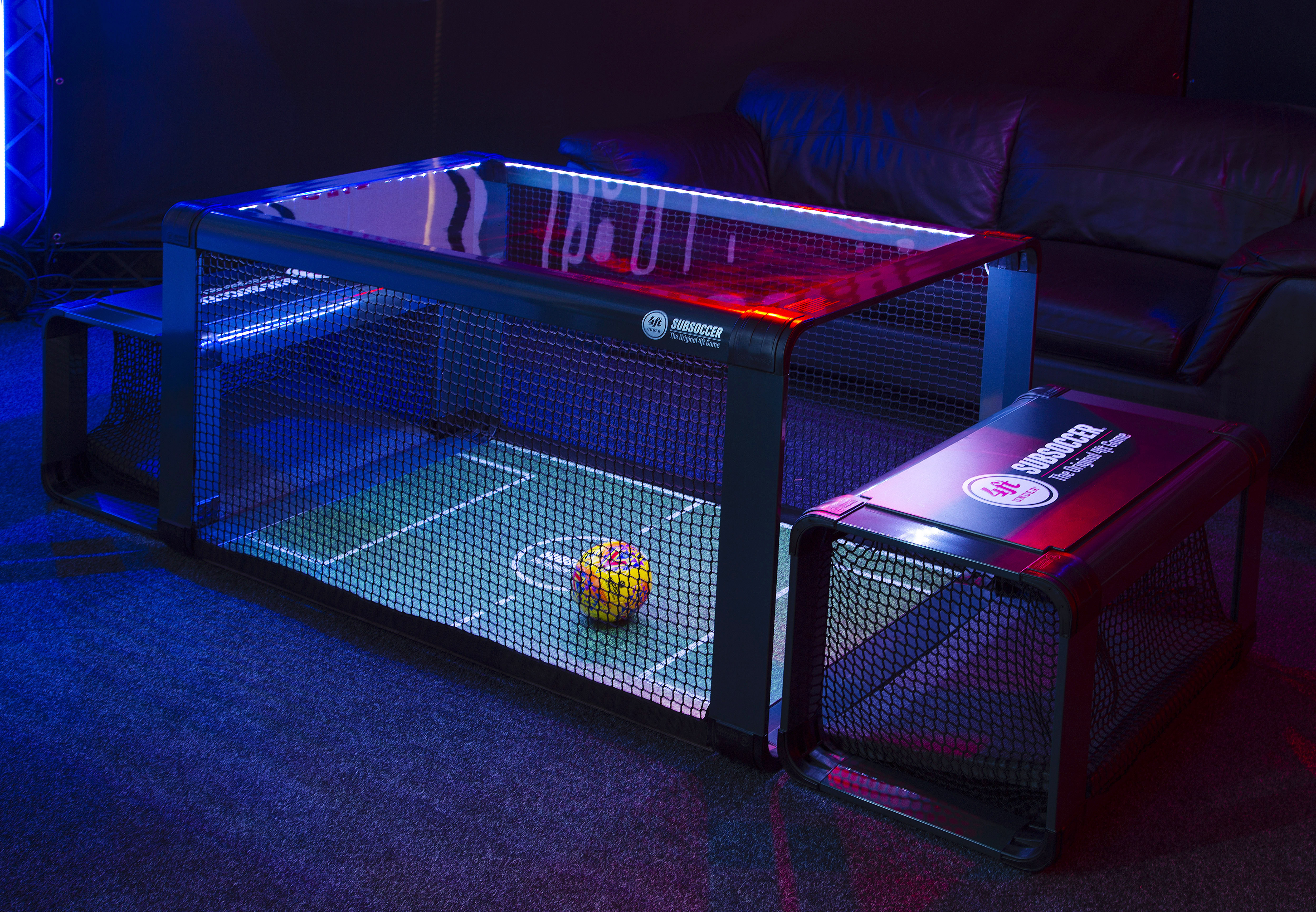 Subsoccer pelipöytä